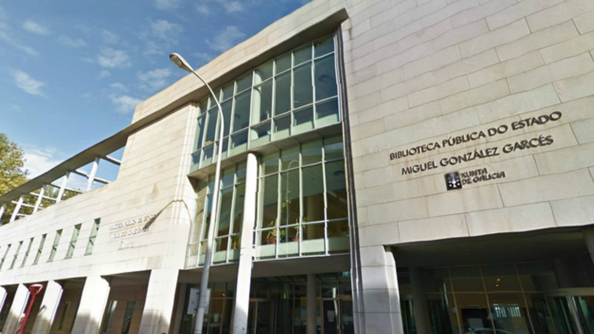 Fachada da Biblioteca Pública da Coruña Miguel González Garcés